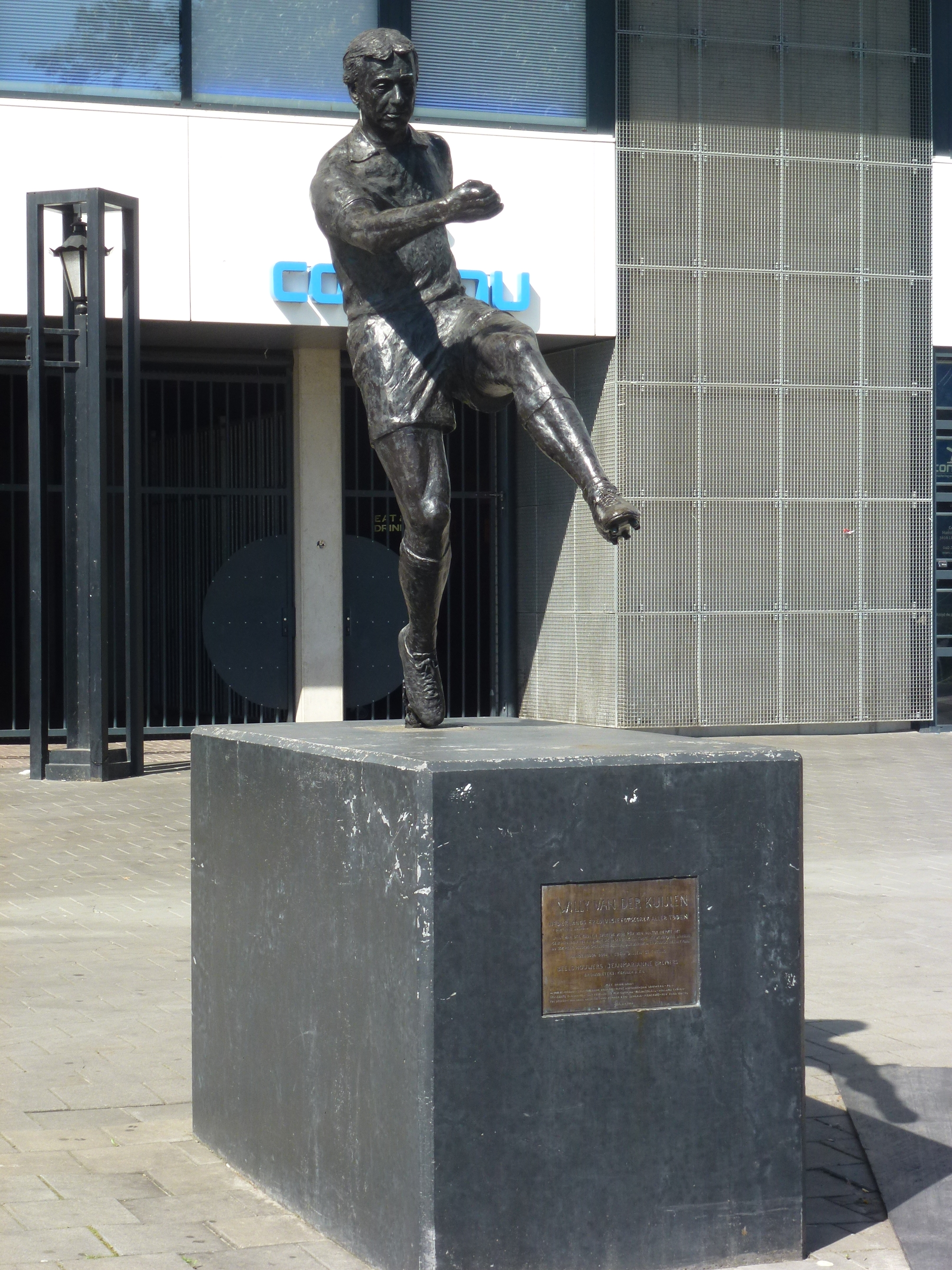 Willy van der Kuijlen, Jean en Marianne Bremers - PSV Stadion Eindhoven